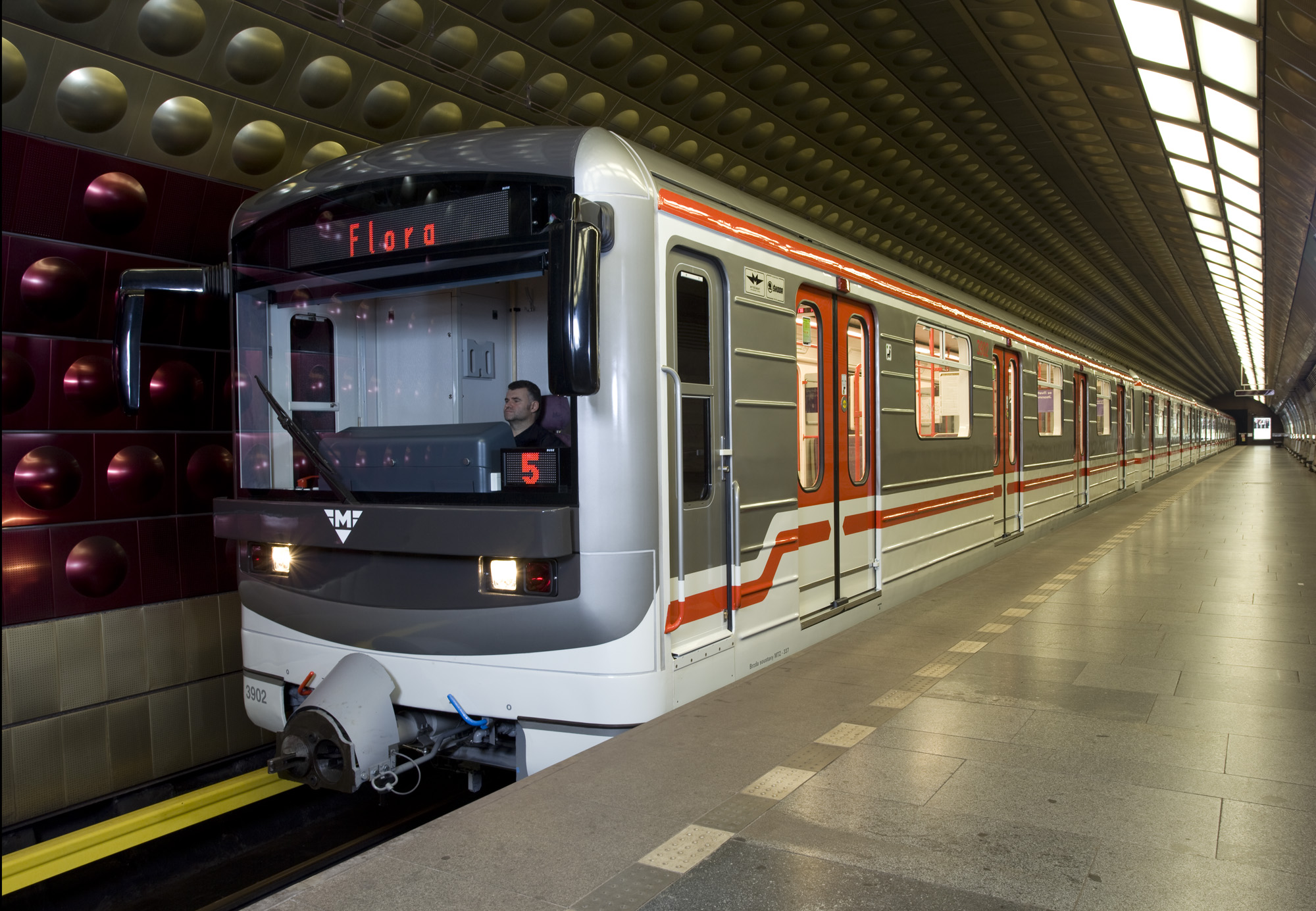 Modernizovaná jednotka pražského metra